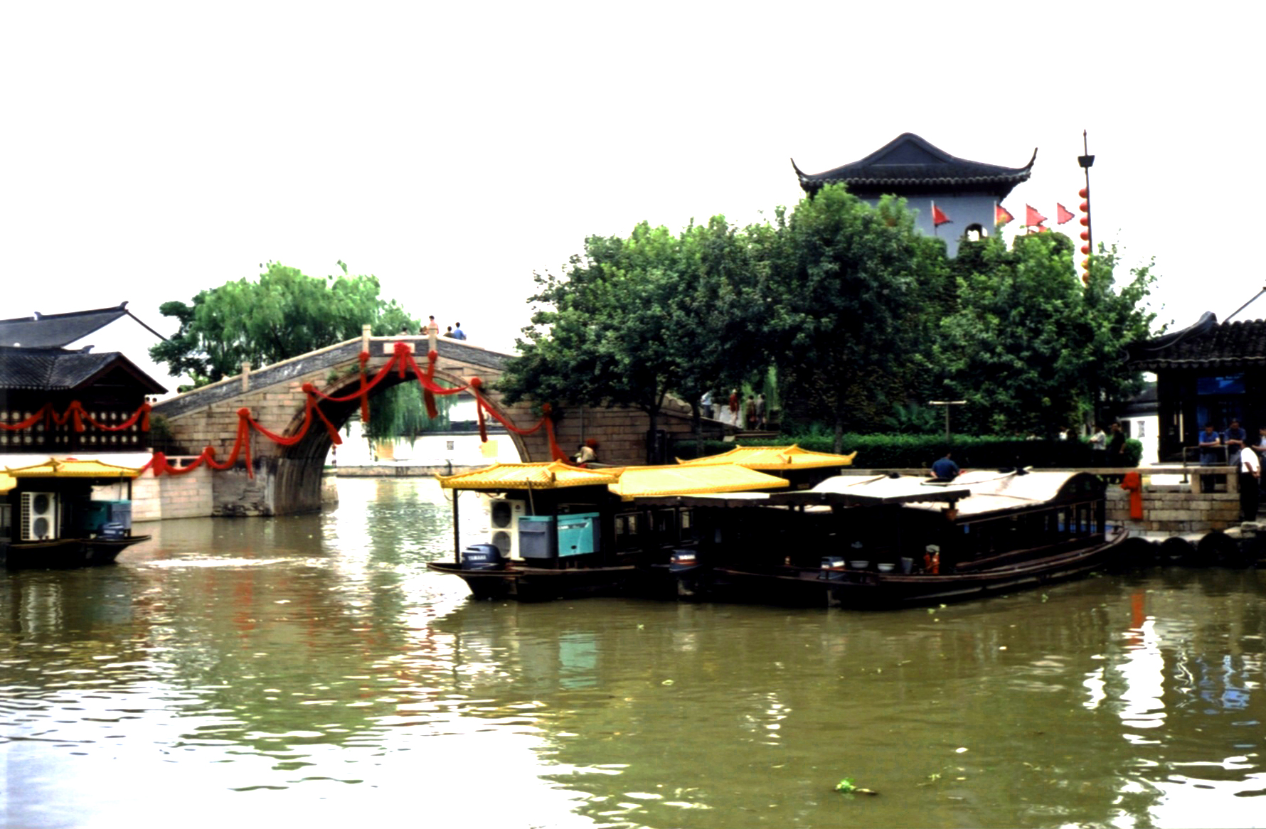 Feng Qiao, Suzhou 苏州枫桥